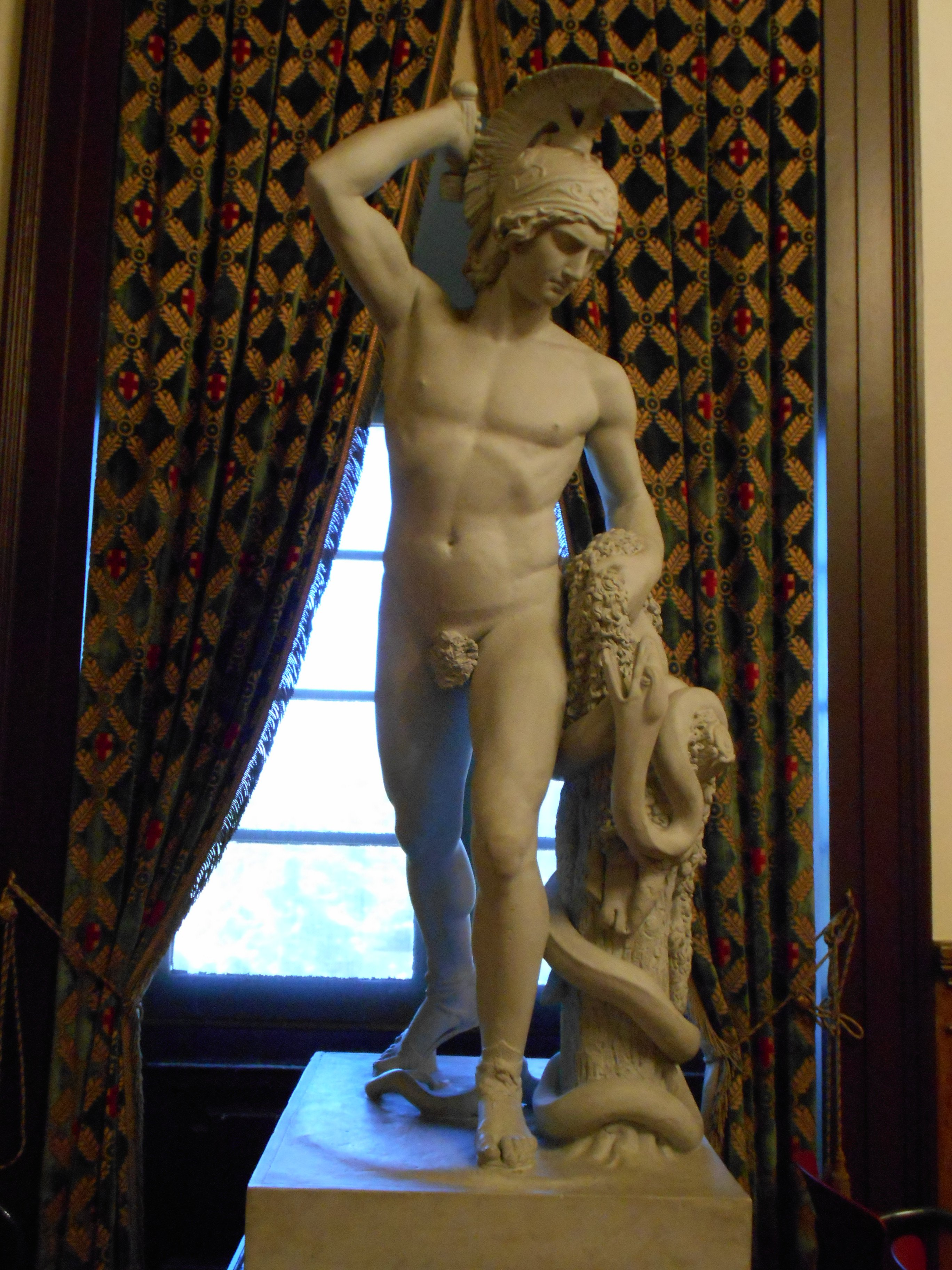 Jasón robando el vellocino de oro (1836), de Manuel Vilar, Reial Acadèmia Catalana de Belles Arts de Sant Jordi.